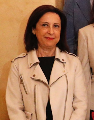 Con la presidenta del Congreso, Ana Pastor Julián, escuchando en el desayuno del Nueva Economía Fórum a la directora de 20minutos.es, Encarna Samitier, hablar sobre los retos del periodismo “en tiempos de ruido”.